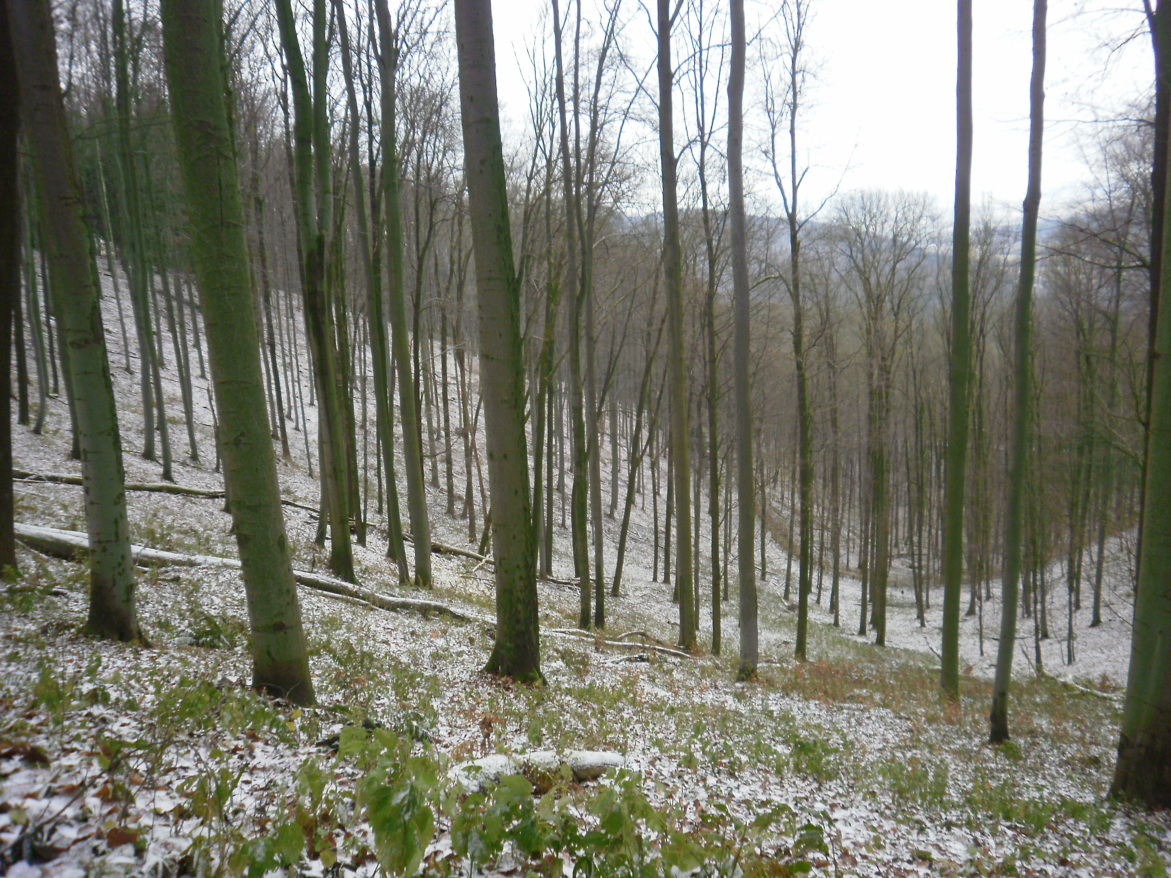 NPR Karlovské bučiny - pohled shora